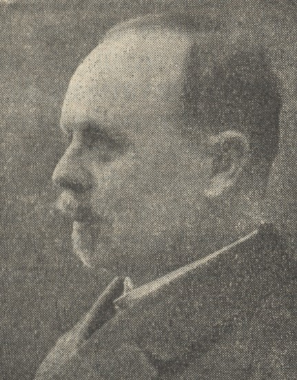 Evankelisten ystävien saarnaaja Kustaa Asp